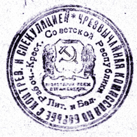 Оттиск печати Чрезвычайной комиссии по борьбе с контрреволюцией и спекуляцией (ЧК) Литовско-Белорусской республики, 1919 г. В центре печати, вероятно, изображен герб Литбела. Отчетливо видны серп и молот, обрамленные снопами колосьев. Внизу: «Пролетарии всех стран, соединяйтесь!». Печать содержит еще две надписи: «Чрезвычайная комиссия по борьбе с контррев. и спекуляцией» и «Рабоч.-Крест. Советской Республики Лит.и Бел.».